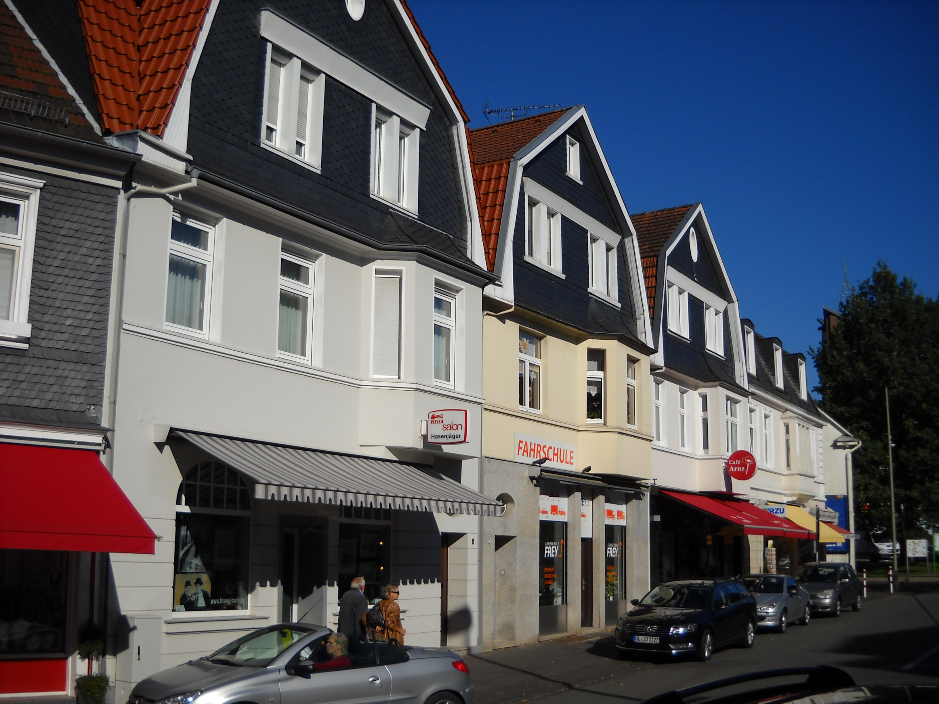 Innenstadt von Burscheid im Rheinland im September 2015.